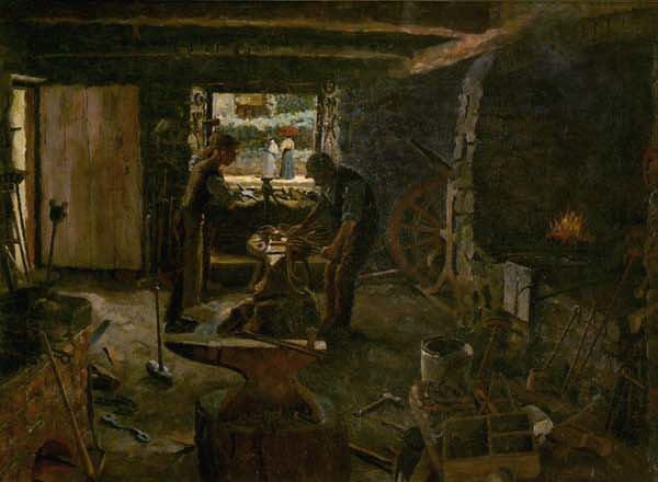 In der Schmiede. Öl auf Leinwand, signiert, datiert: (18)92; 50 x 68 cm